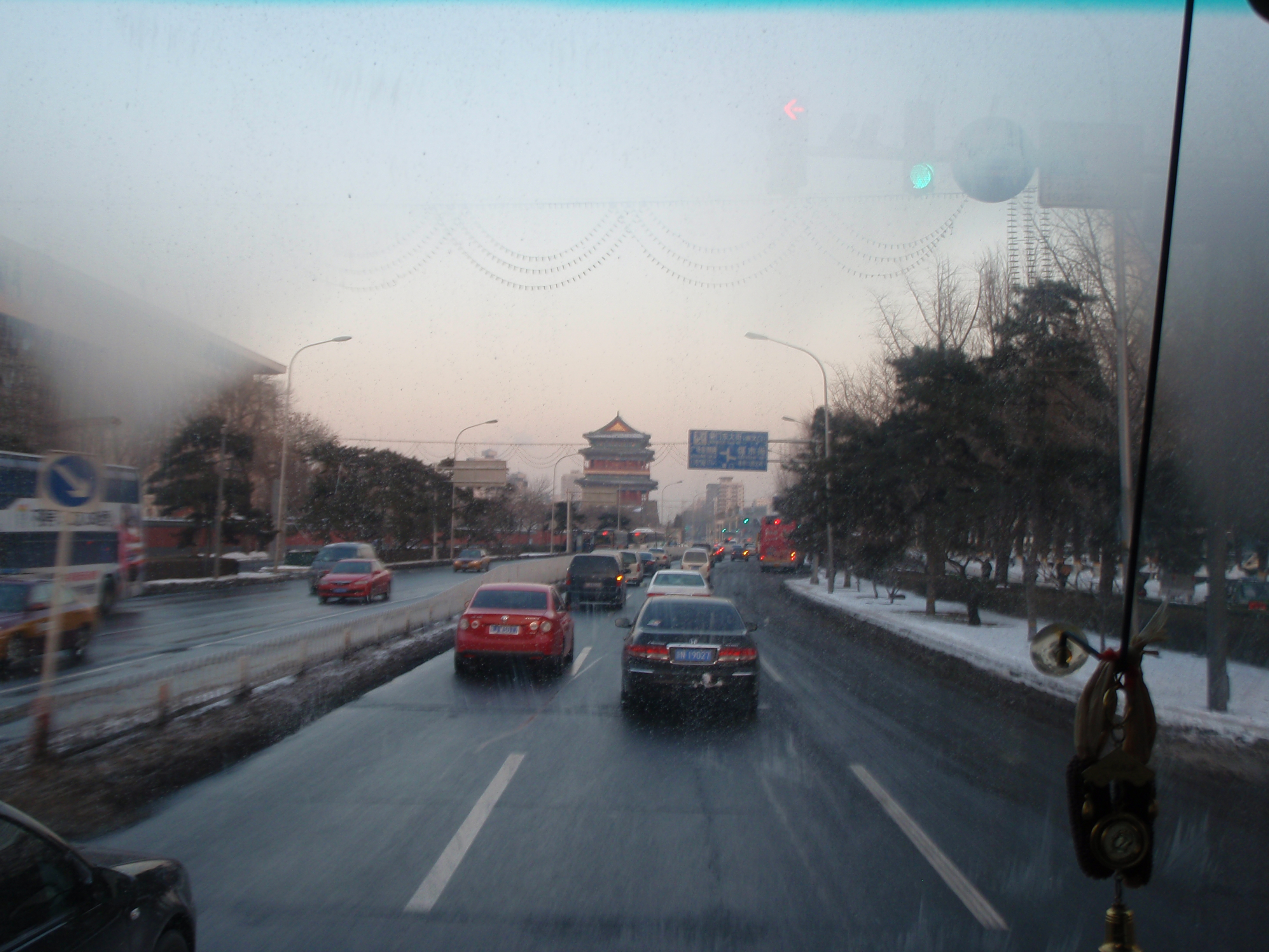 雪中的正阳门